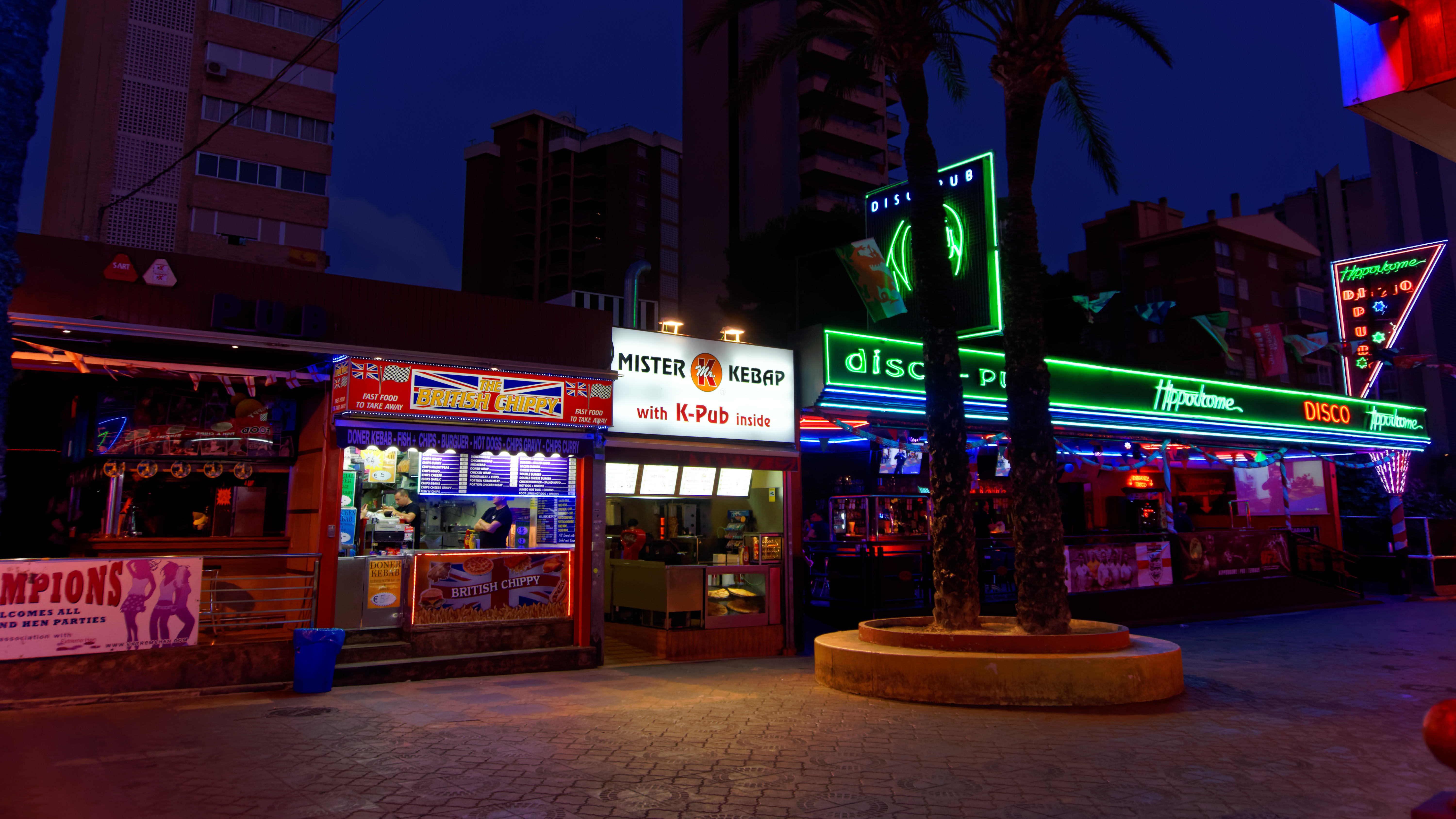 2014-07-07_21-50-26_ILCE-6000_5099_DxO